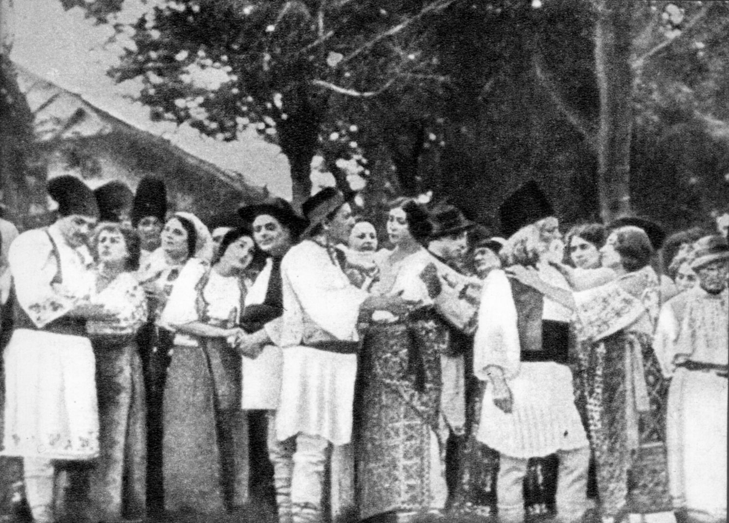 Frame from Independenţa României film (1912). The village, departure. From left to right: Aurel Athanasescu, Jeni Metaxa-Doro, Adelina Mărculescu, Nicolae Soreanu, Vasile Toneanu, Maria Filotti, Gheorghe Ciprian, Angela Luncescu.